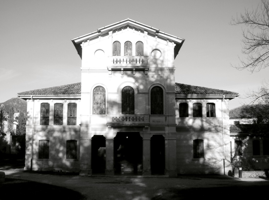 Ceneda: Villa Costantini Papadopoli (XIX secolo), annesso ospitante la biblioteca.